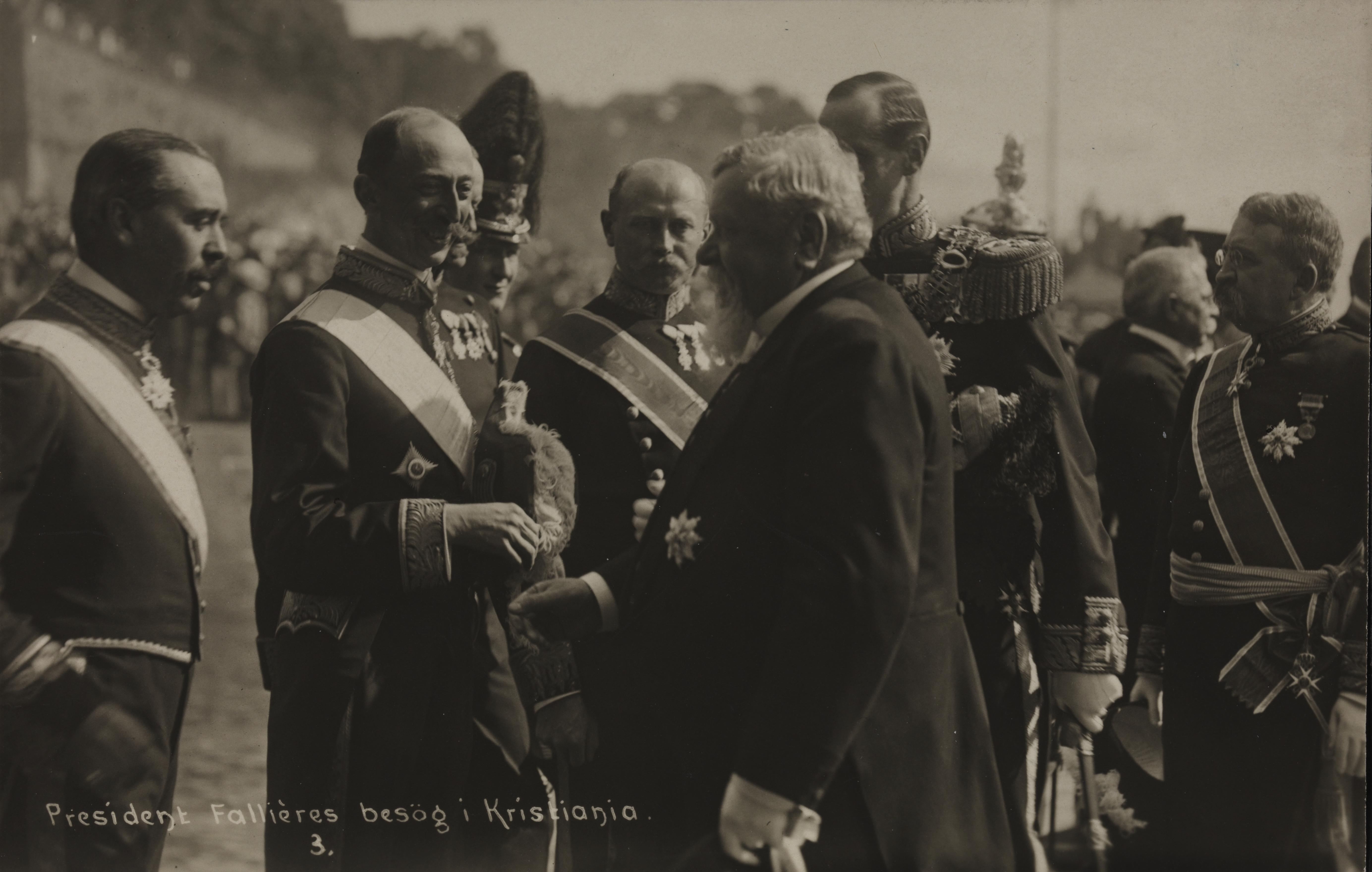 Bildet er hentet fra Nasjonalbibliotekets bildesamling Rådhuskaia, Oslo, Oslo Depicted person: Haakon VII konge av Norge Depicted person: Fallières, Clément Armand